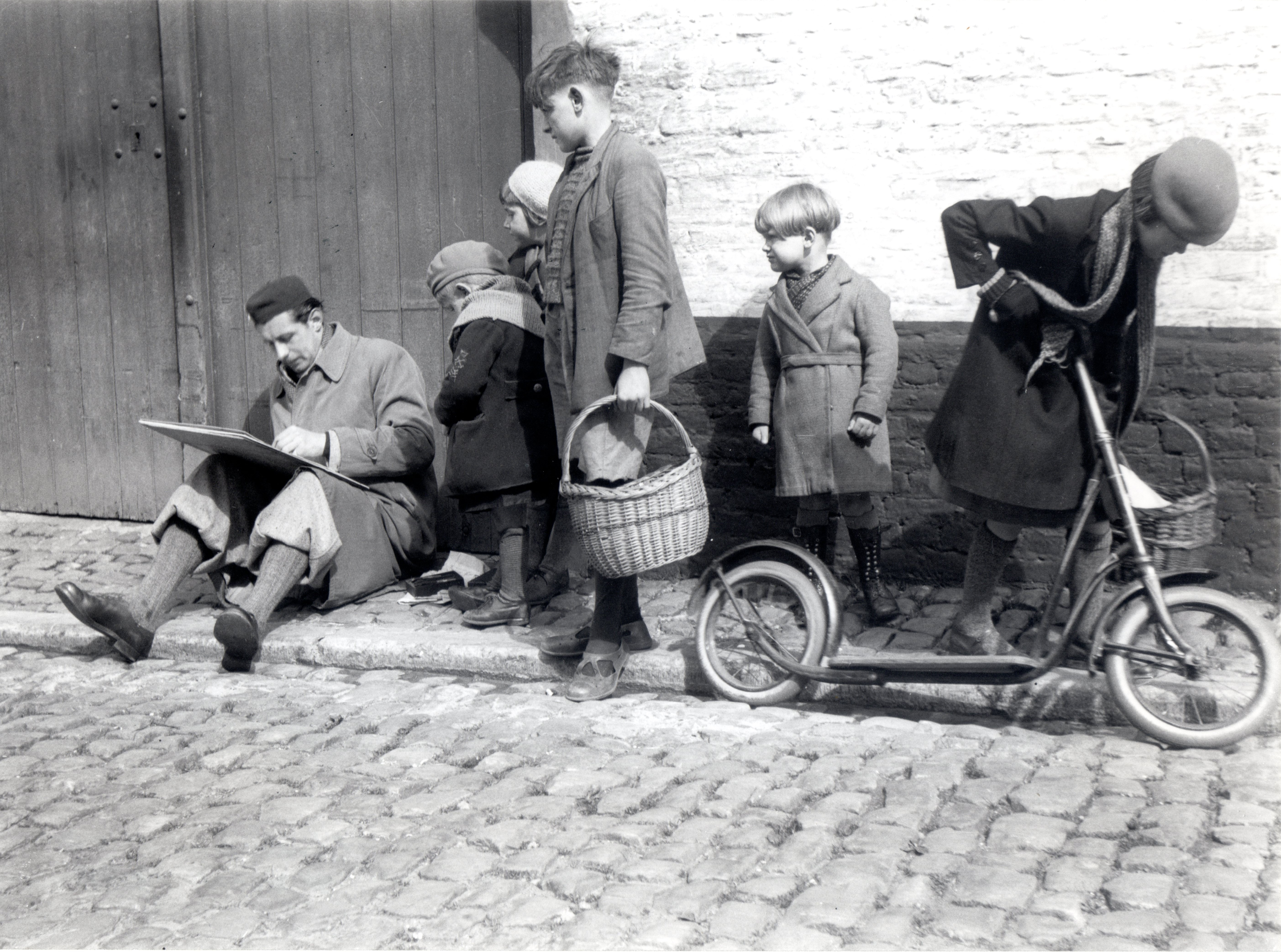 Lismonde dessinant l'église de Diest le 7 avril 1936. Cette photo a été publiée dans le livre Lismonde par Philippe Roberts-Jones, Laconti, Bruxelles, 1977, p. 16.